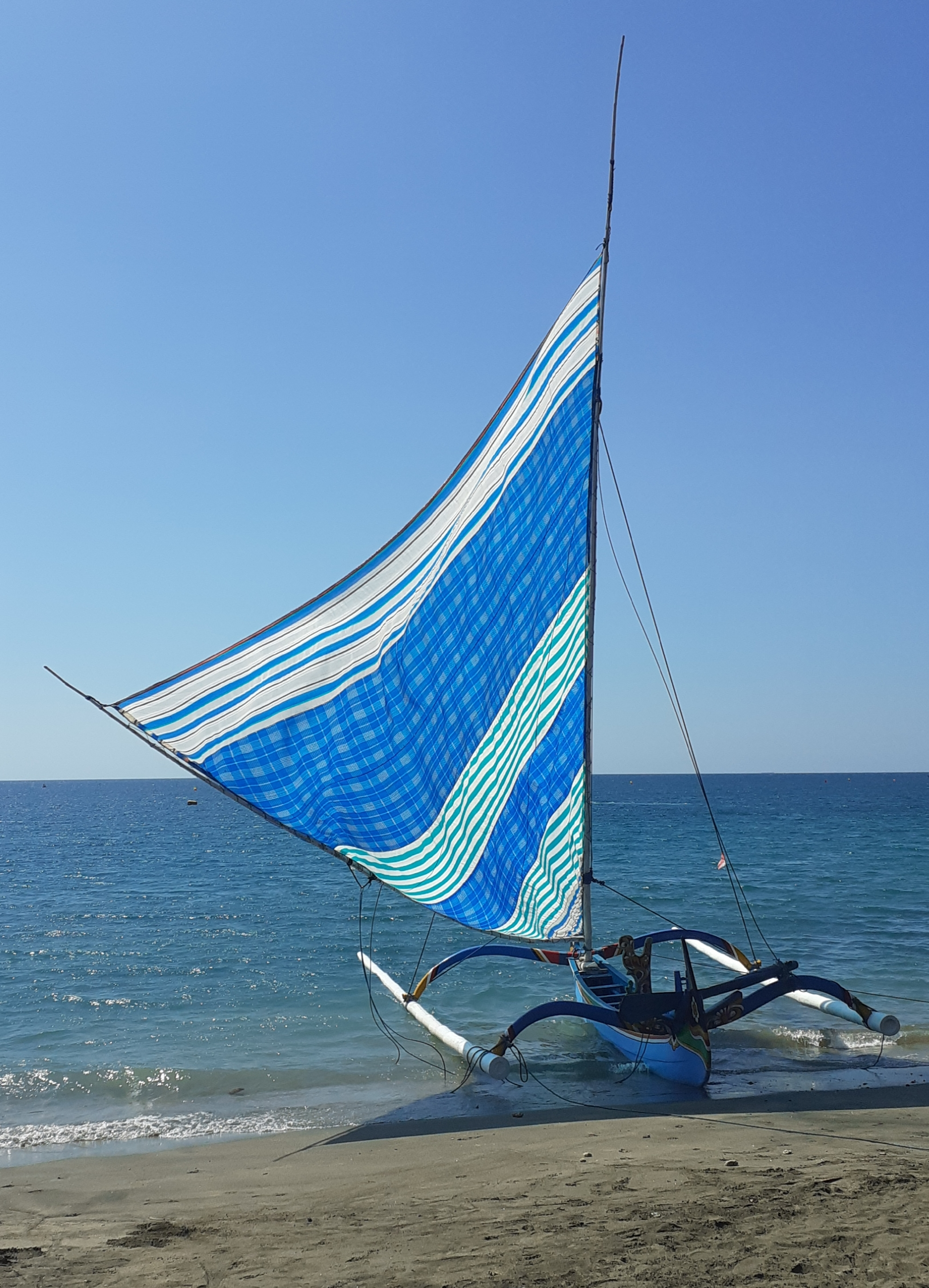 Sebuah perahu dengan layar berwarna biru, sedang berlabuh di Pantai Pasir Putih di Kabupaten Situbondo